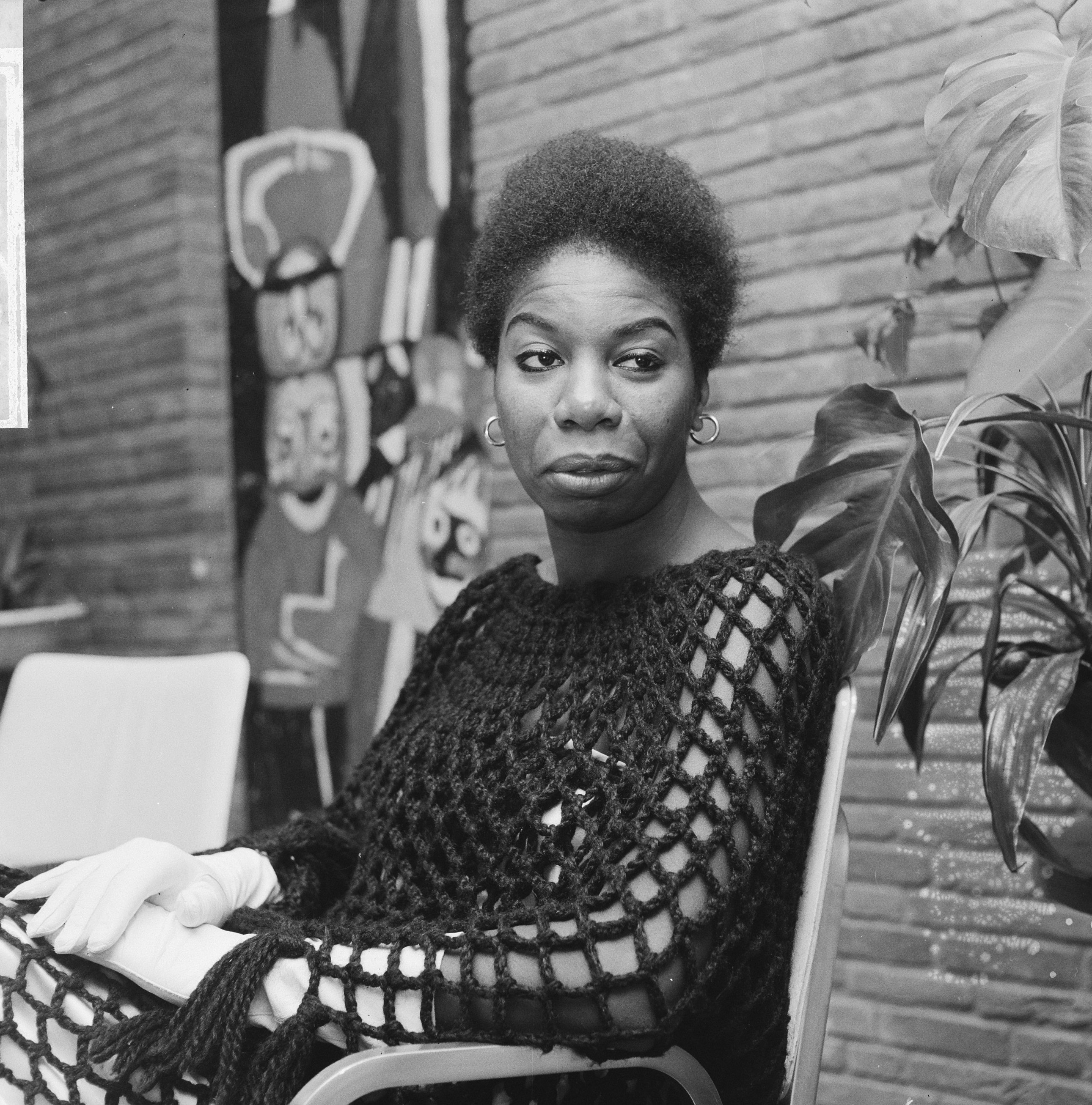 Collectie / Archief : Fotocollectie Anefo Reportage / Serie : [ onbekend ] Beschrijving : Portret van de Amerikaanse zangeres Nina Simone die met kerst op televisie zal verschijnen Datum : 14 december 1965 Trefwoorden : portretten, zangers Persoonsnaam : Simone, Nina Fotograaf : Kroon, Ron / Anefo, [onbekend] Auteursrechthebbende : Nationaal Archief Materiaalsoort : Negatief (zwart/wit) Nummer archiefinventaris : bekijk toegang 2.24.01.03 Bestanddeelnummer : 918-5604